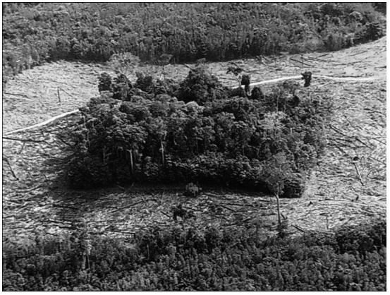 Fotografiado por R.O. Bierregaard; Laurance 2009.